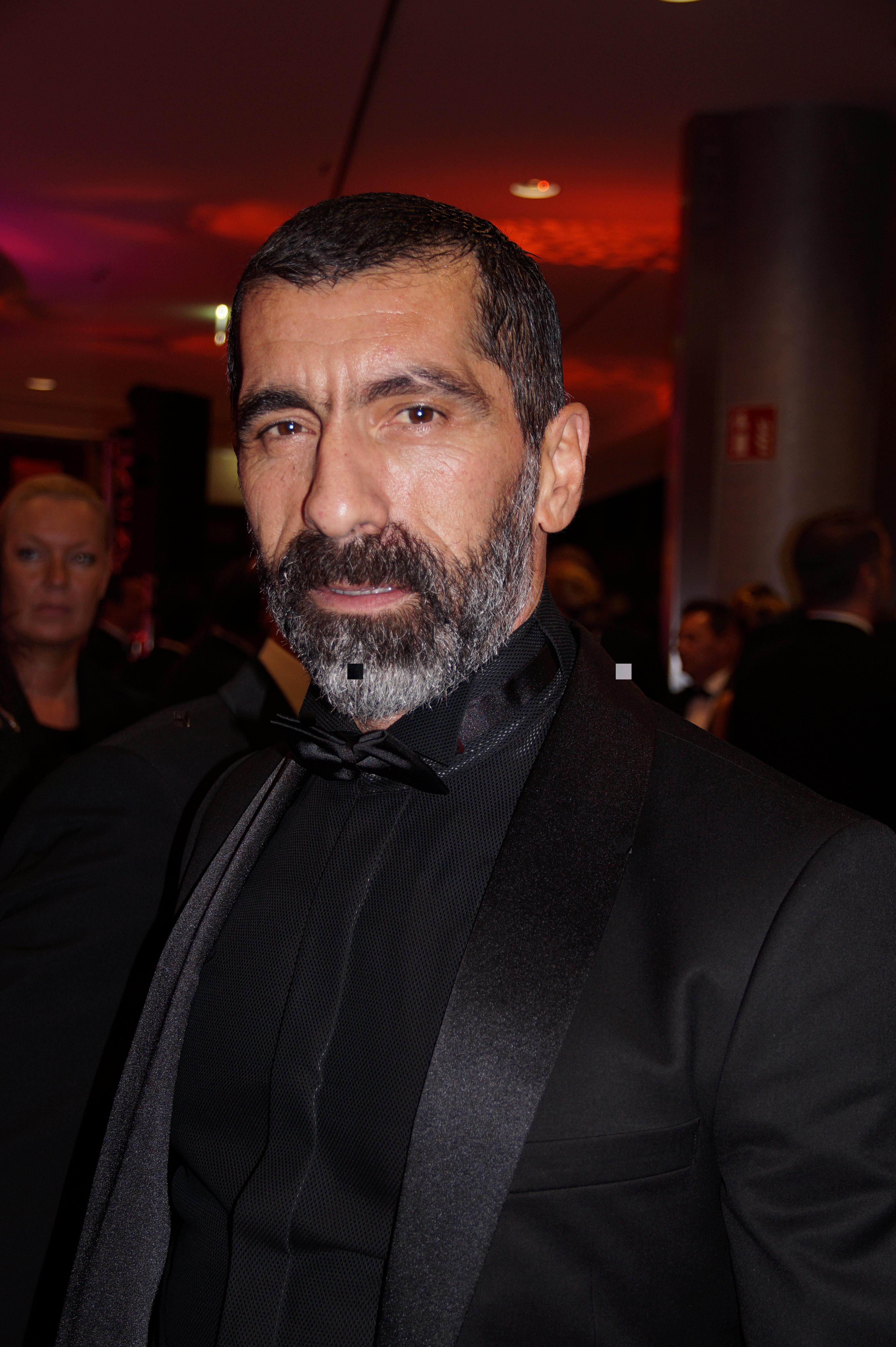 Erdal Yildiz beim KölnBall 2016, am 29.10.2016 im Kölner Maritim Hotel.